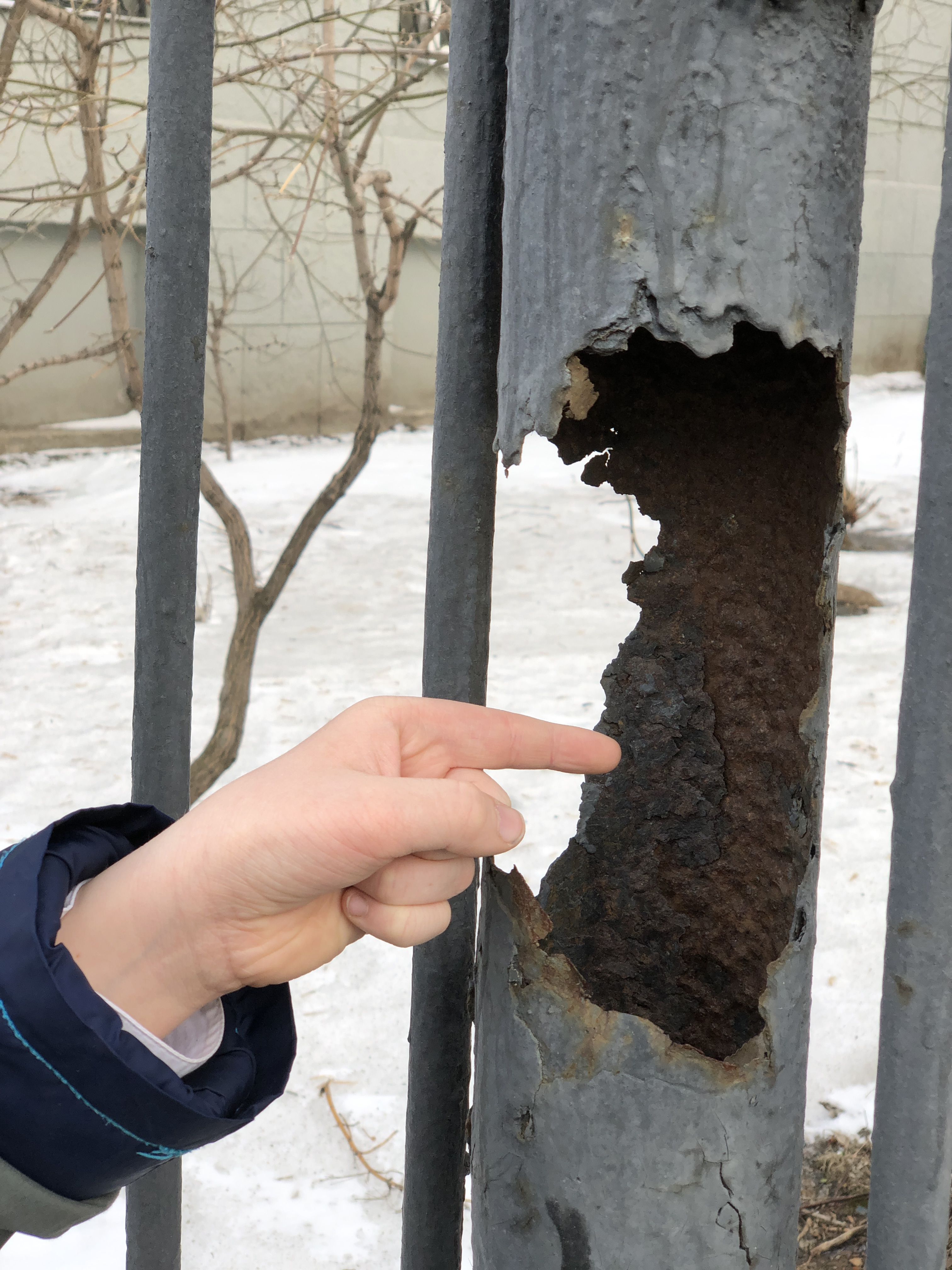 Коррозия металла